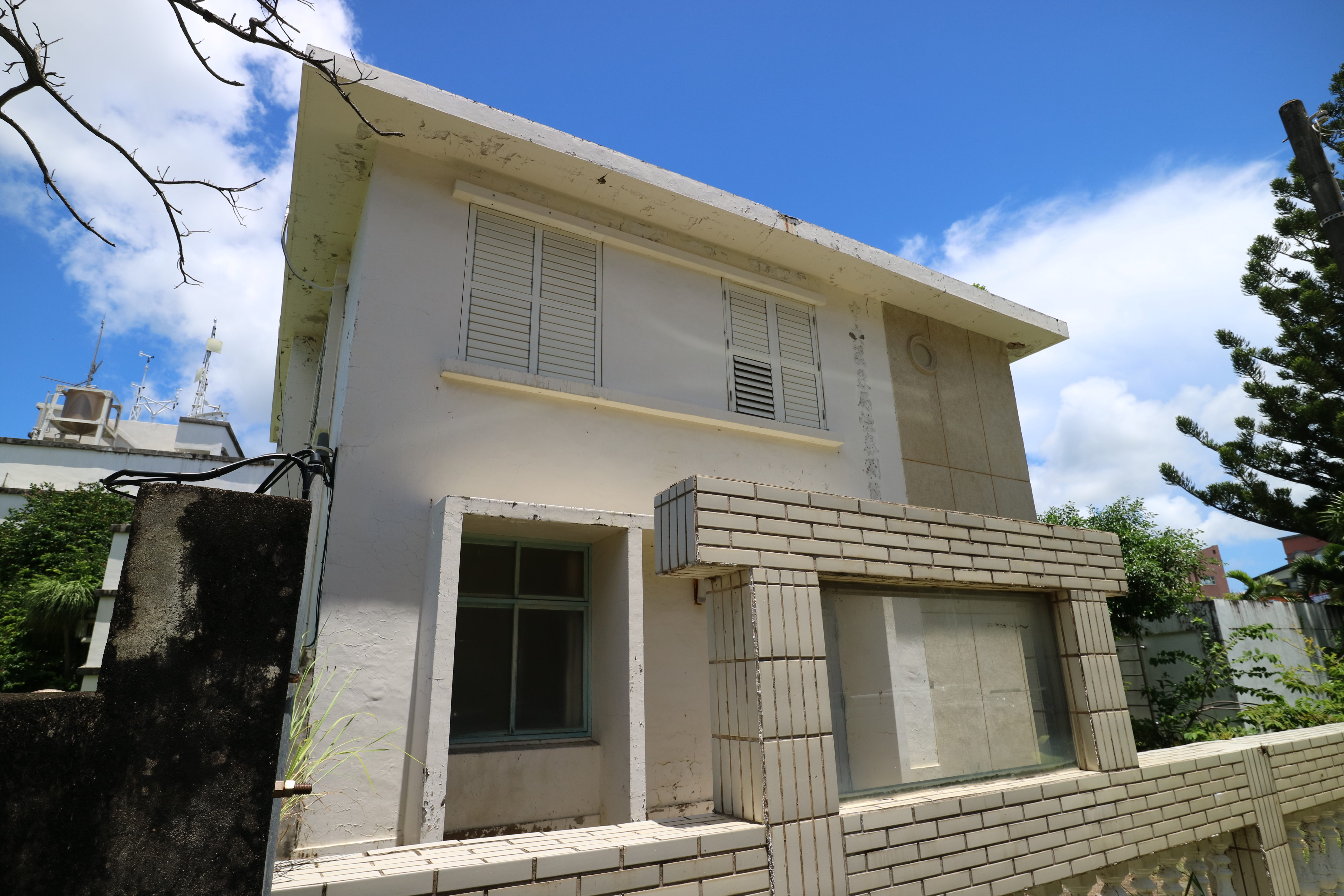 中文（台灣）: 交通部中央氣象局恆春氣象站舊辦公廳